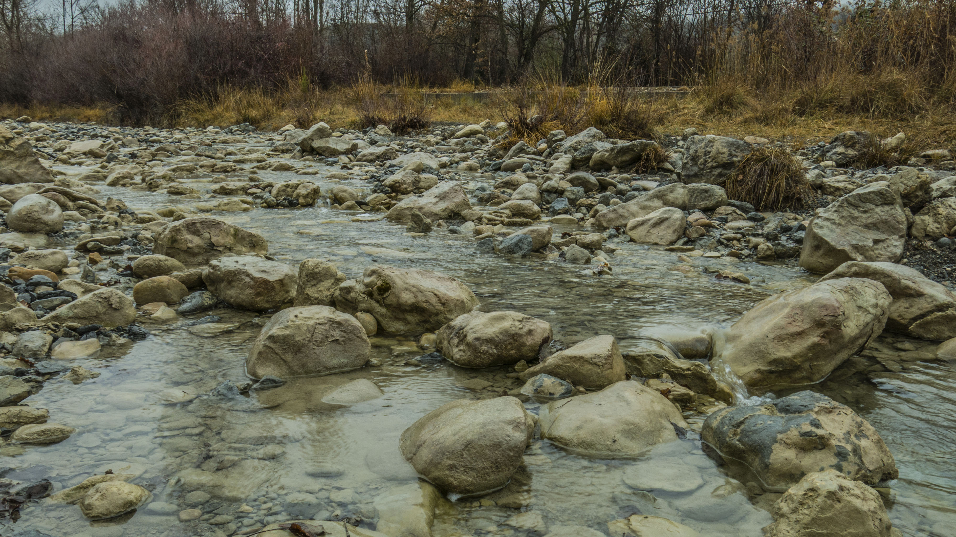 És un afluent del riu Isàvena. Les aigüés del barranc de Carrasquer baixen cap a l'est entre la serra del Jordal i la serra d'Esdolomada, i desemboquen al riu Isàvena a la Pobla de Roda.